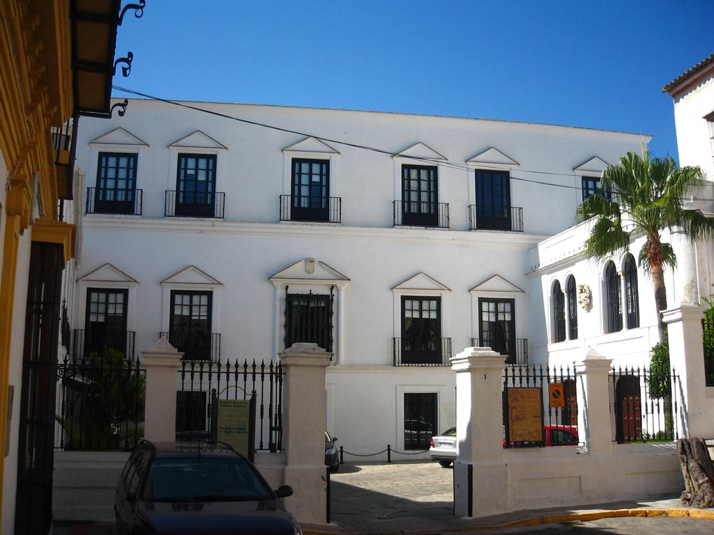 Fachada principal del Palacio Ducal de Medina-Sidonia, en Sanlúcar de Barrameda